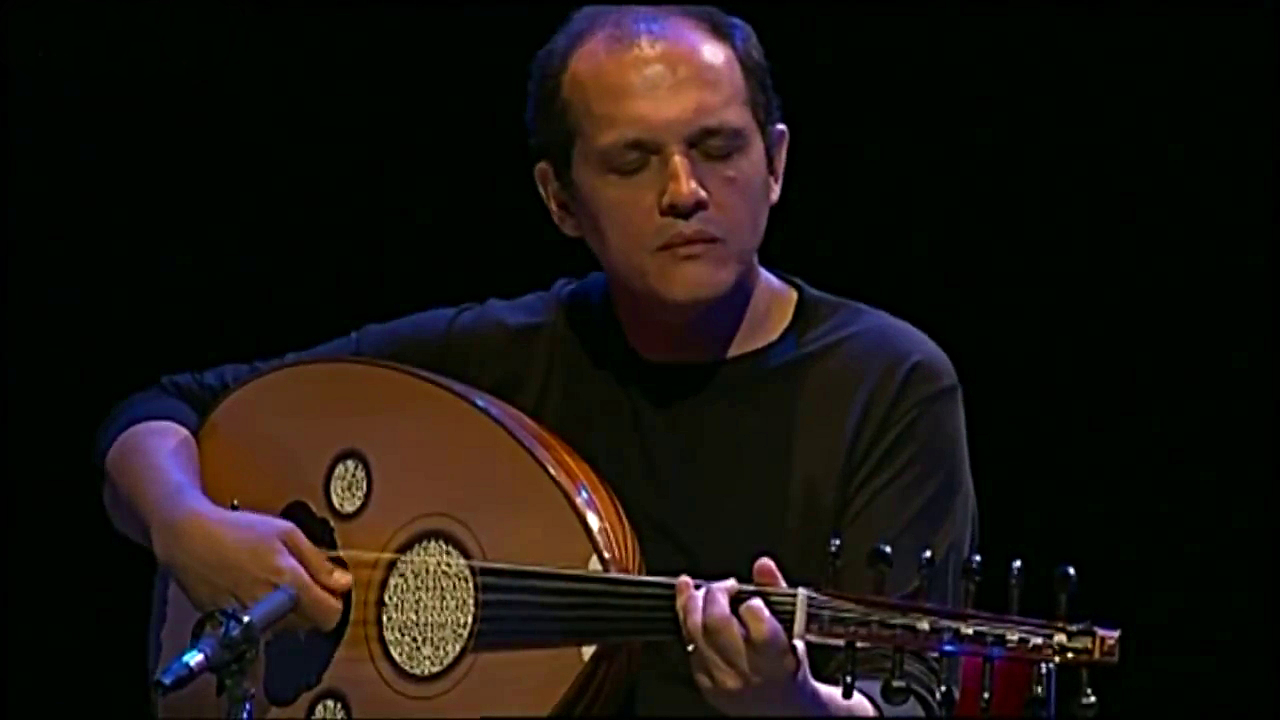 Capture d'écran de l’interview exclusive de Anouar Brahem à Nawaat.